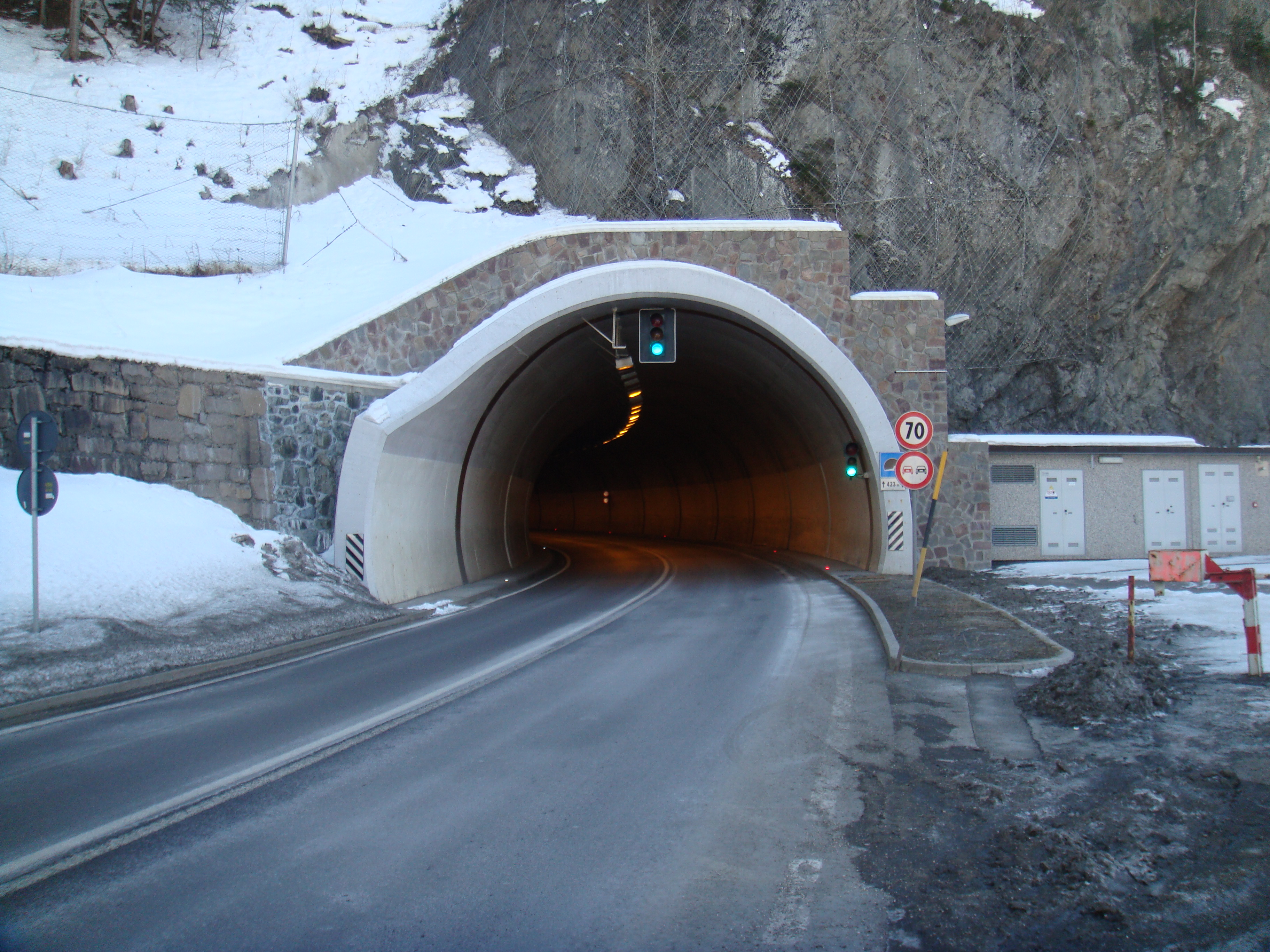 Nordportal Tunnel "Punt de fer" im Gadertal. 423m lang bei km 23 auf der SS 244